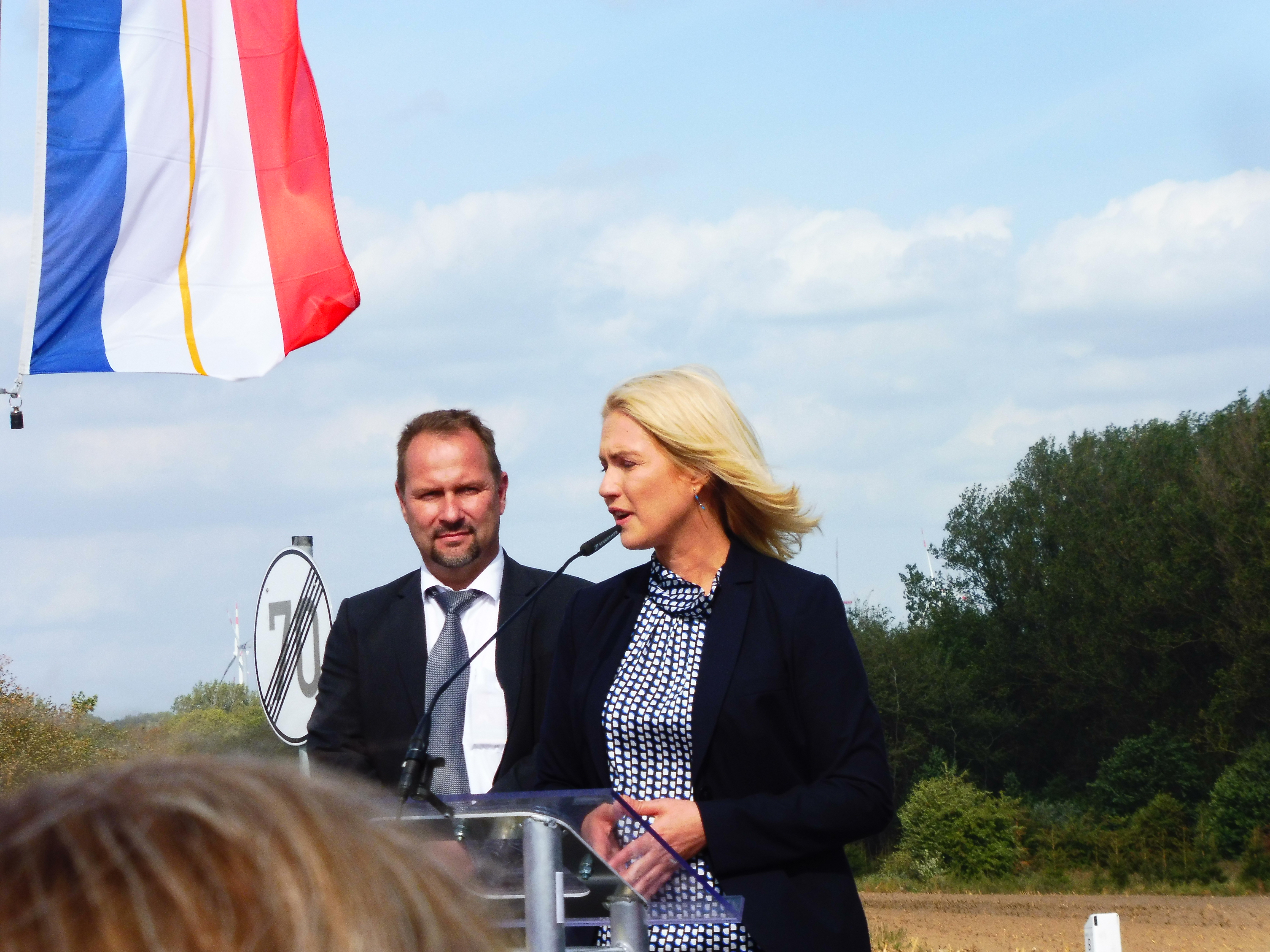 Einweihung der Nordumgehung Plau am See im Zuge der B 191 mit Stefan Anker, Leiter des Straßenbauamtes Schwerin, und Manuela Schwesig, Ministerpräsidentin des Landes Mecklenburg-Vorpommern.